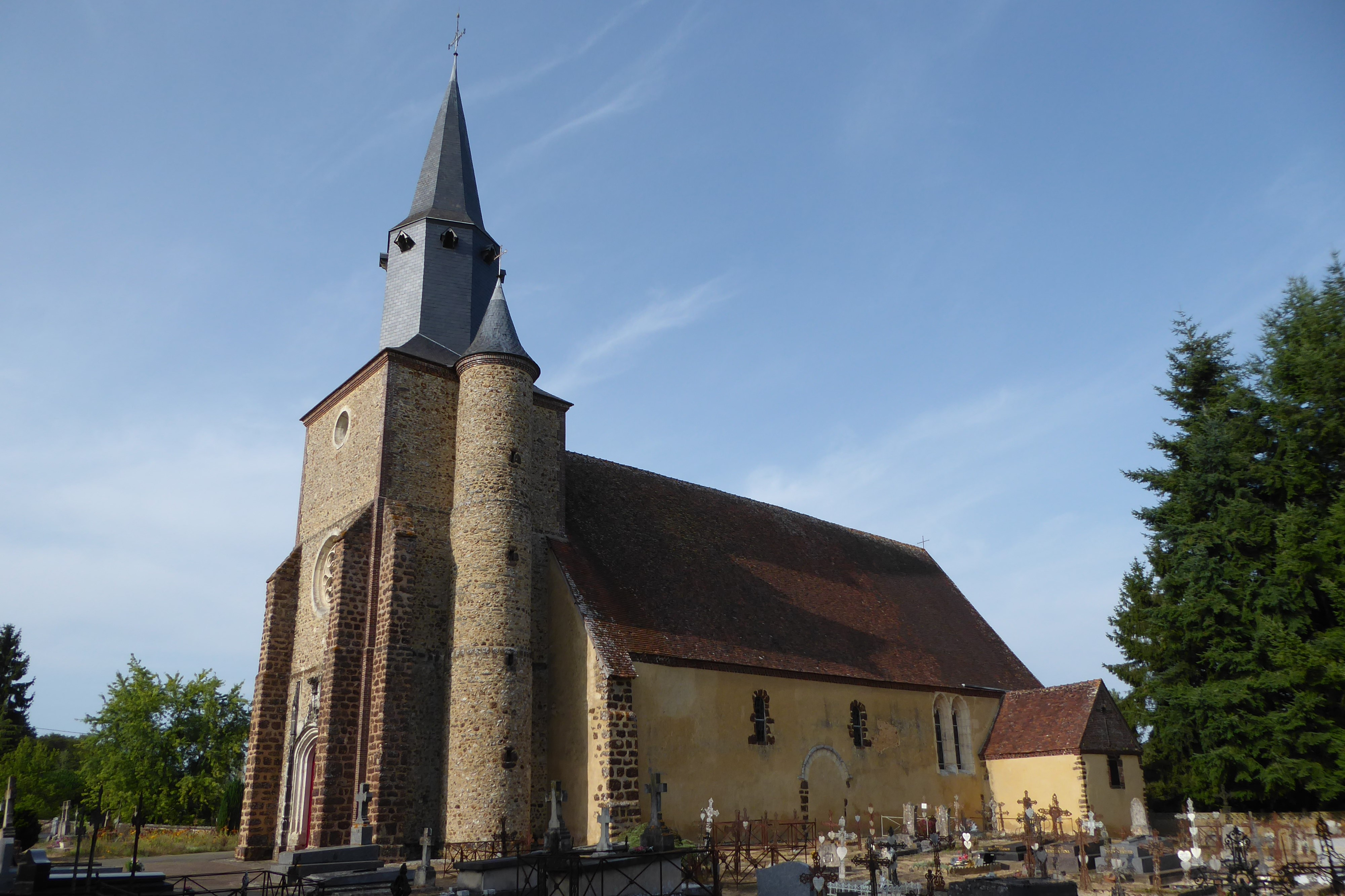 église Saint-Pierre, Montigny-le-Chartif, Eure-et-Loir (France).